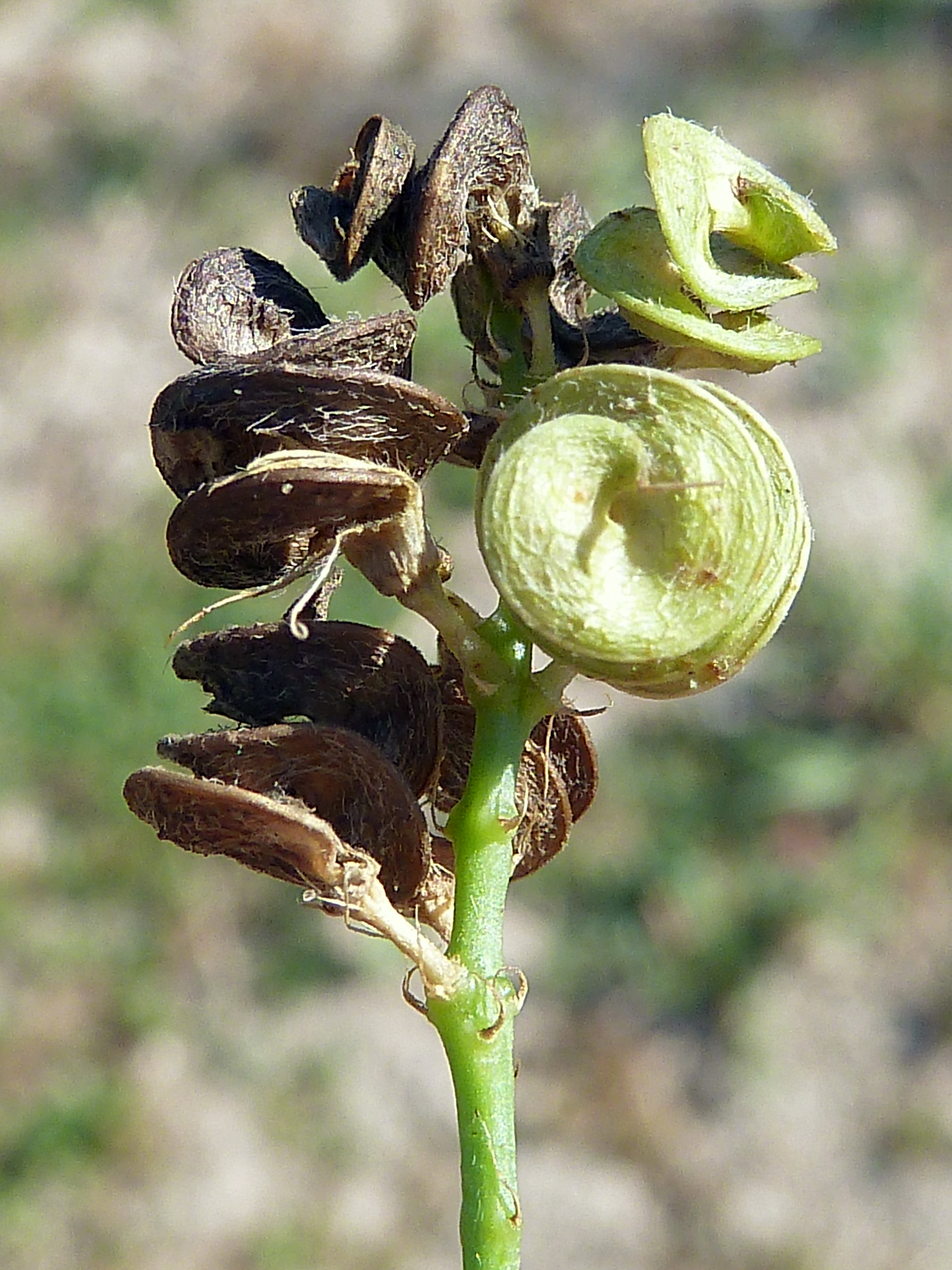 Medicago sativa sativa (Alfalfa) : Frutos en hélices siniestras (inmaduros y maduros) - Camino de la Azarbe de Patricio, Albatera (Alicante, España).